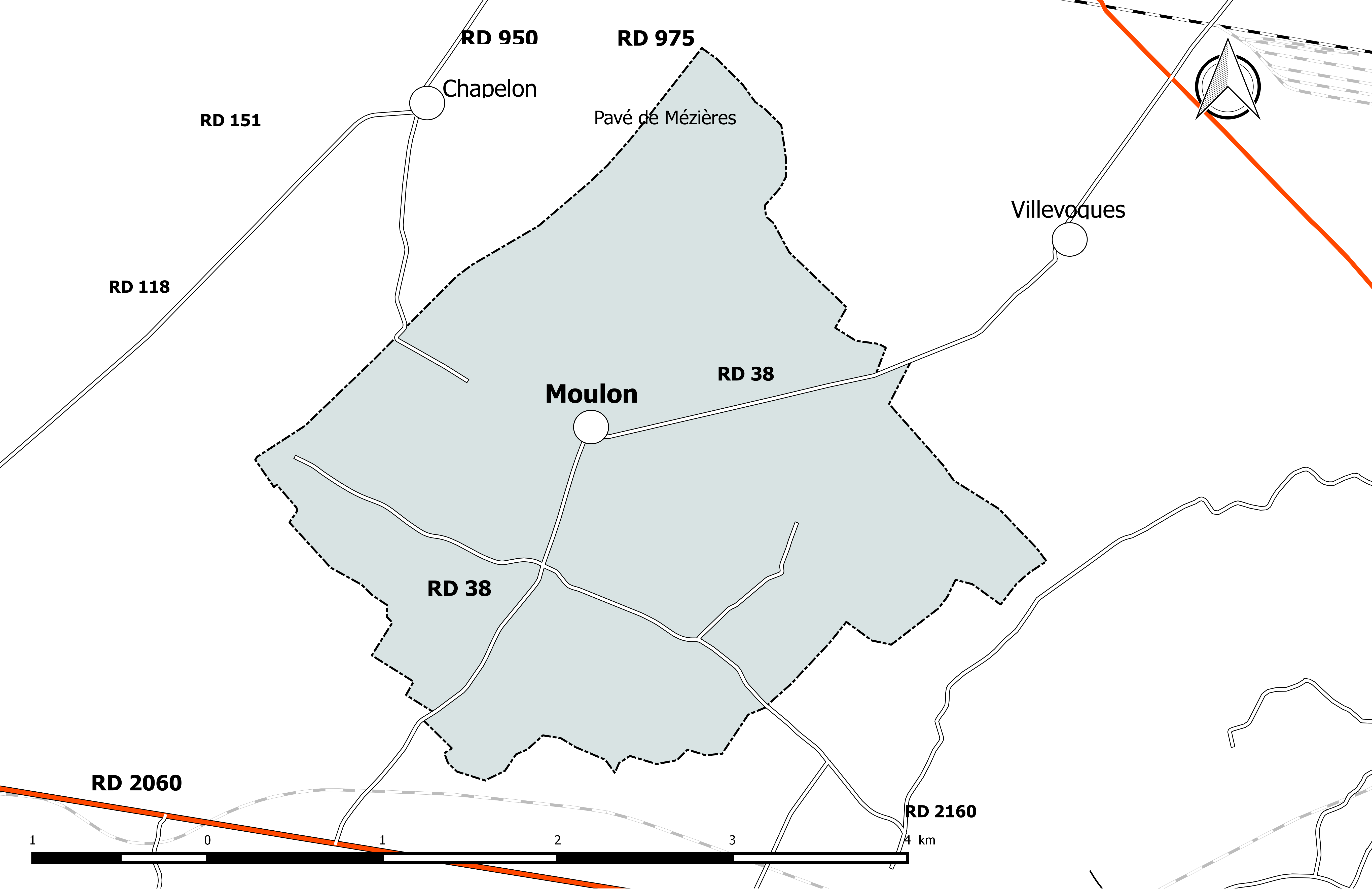 Carte du réseau routier de la commune de Moulon (Loiret).